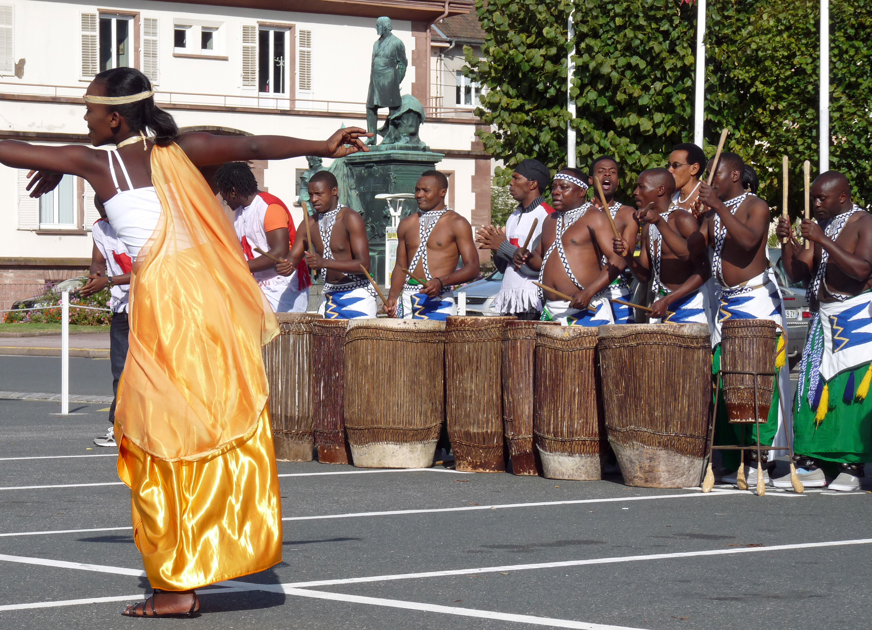 Danseuse et tambourinaires du Ballet national du Rwanda dans le cadre du 22e Festival international de géographie de Saint-Dié-des-Vosges. A l'arrière-plan, statue de Jules Ferry